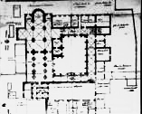 Carte de l'ancienne abbaye de Pothières (Côte-d'Or)